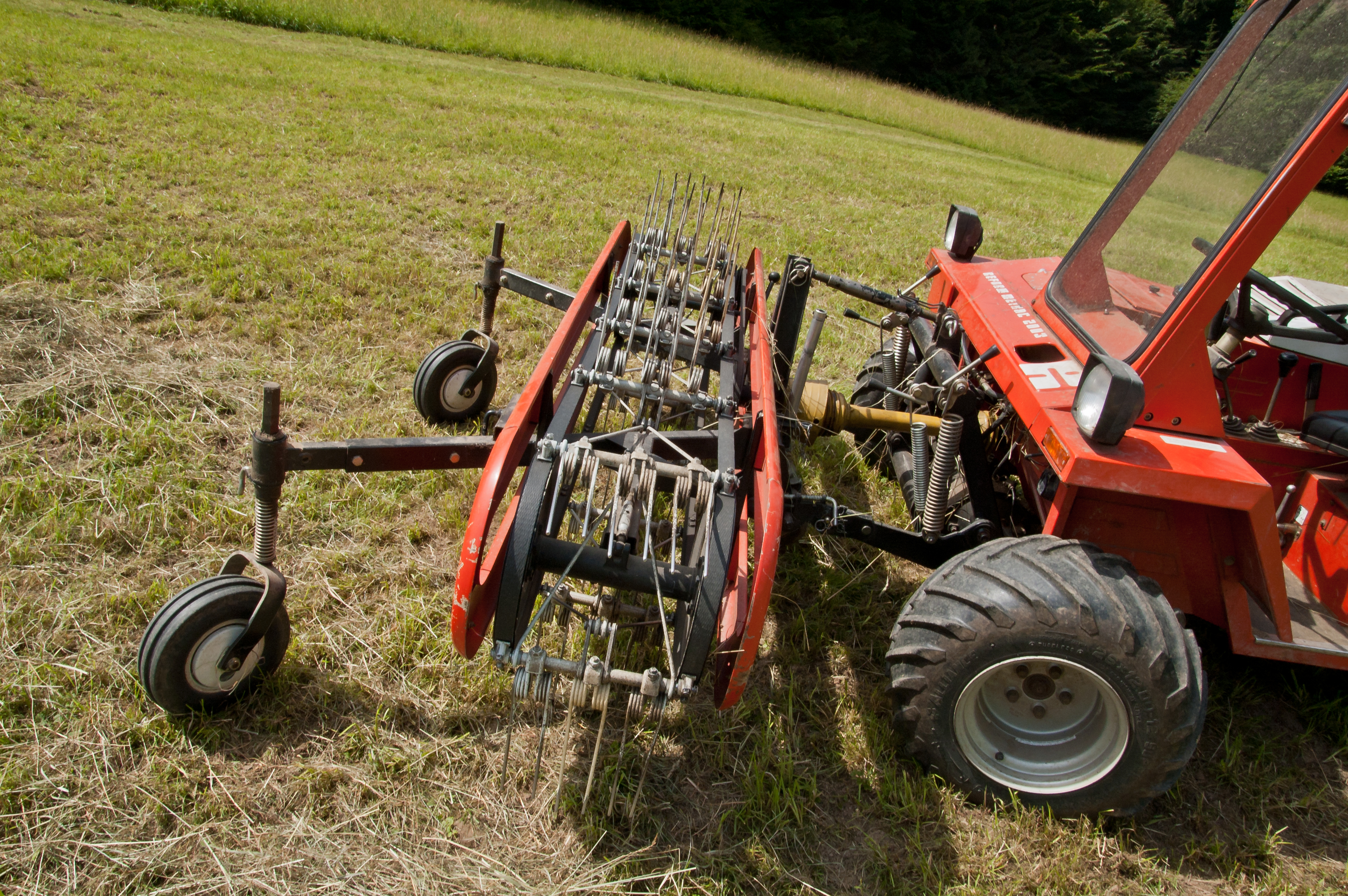 Bandrechen an einem Reform Metrac 2003